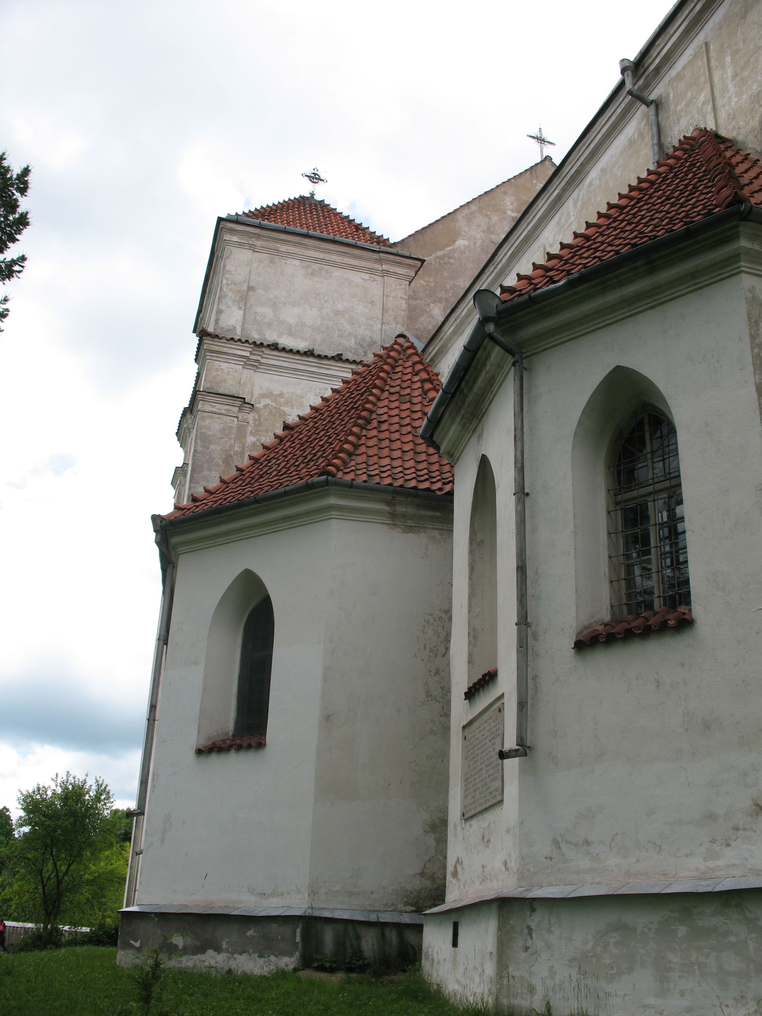 Беларуская (тарашкевіца): Фарны касьцёл з надмагільным помнікам загінулым у бітве пад Хоцінам у 1621 годзе. г. Наваградак This is a photo of Belarusian heritage monument. Reference number: 411Г000403 ( WLM)